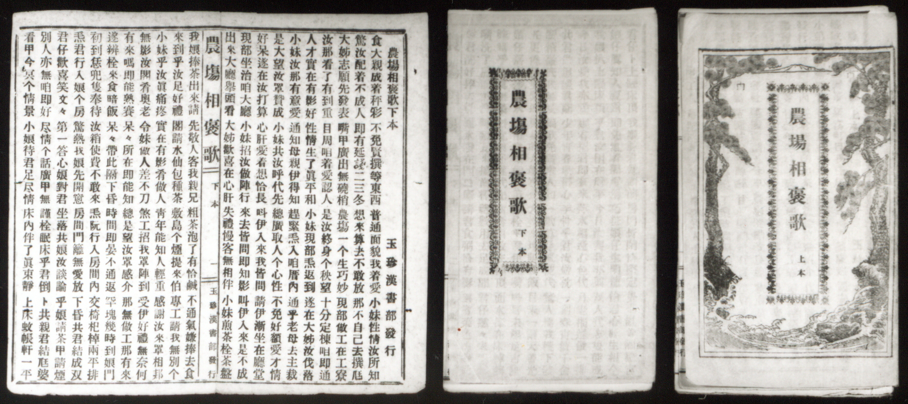 日治時期的歌仔冊，係以漳泉俗語土腔文字寫的歌詞，此文字記載是可貴的「方言俗字」研究的好資料，內容是台南州嘉義市西門町一丁目十七番地，玉珍漢書部於1934年發行的《農場相褒歌》上、下冊。